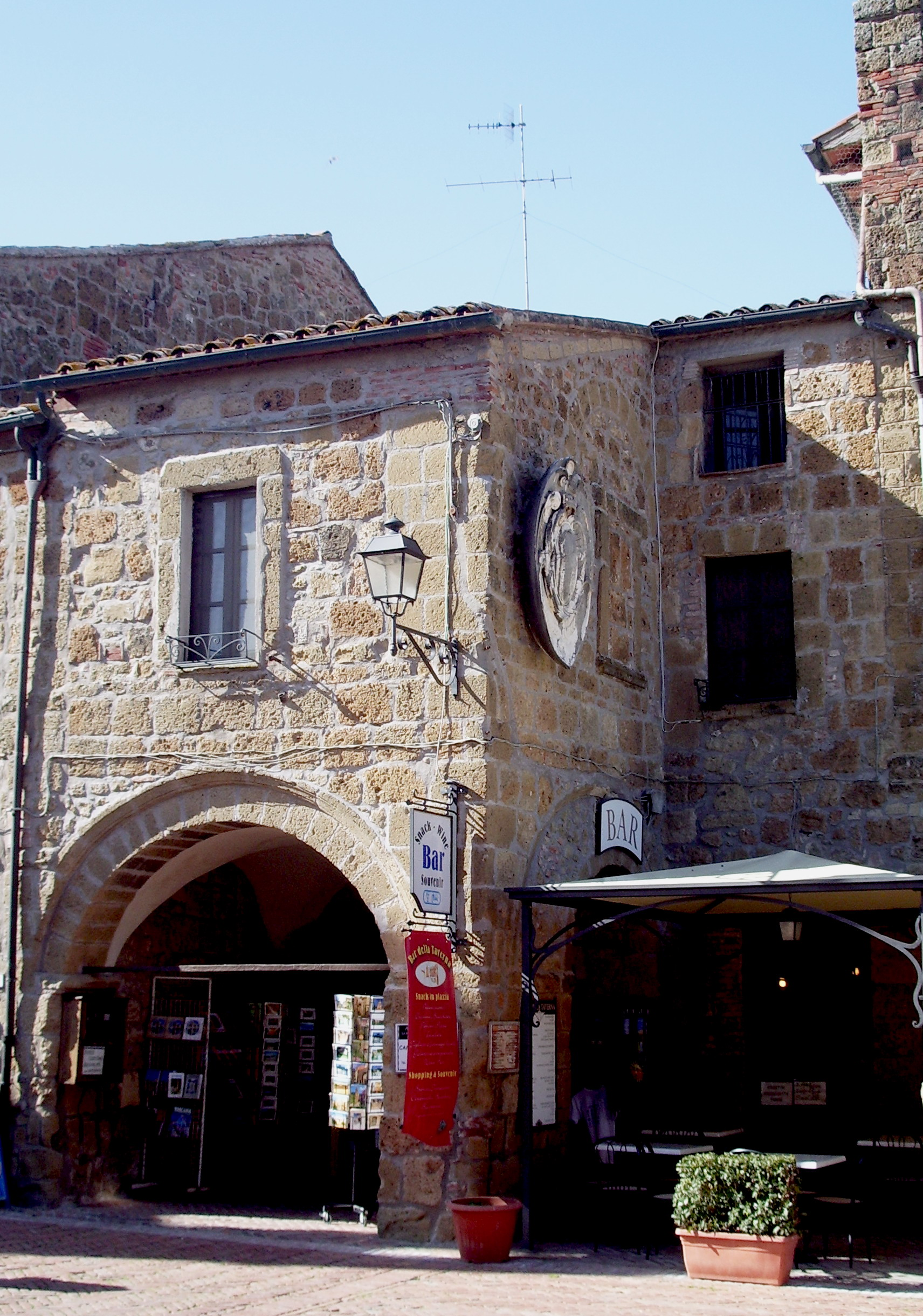 La Loggia del Capitano a Sovana